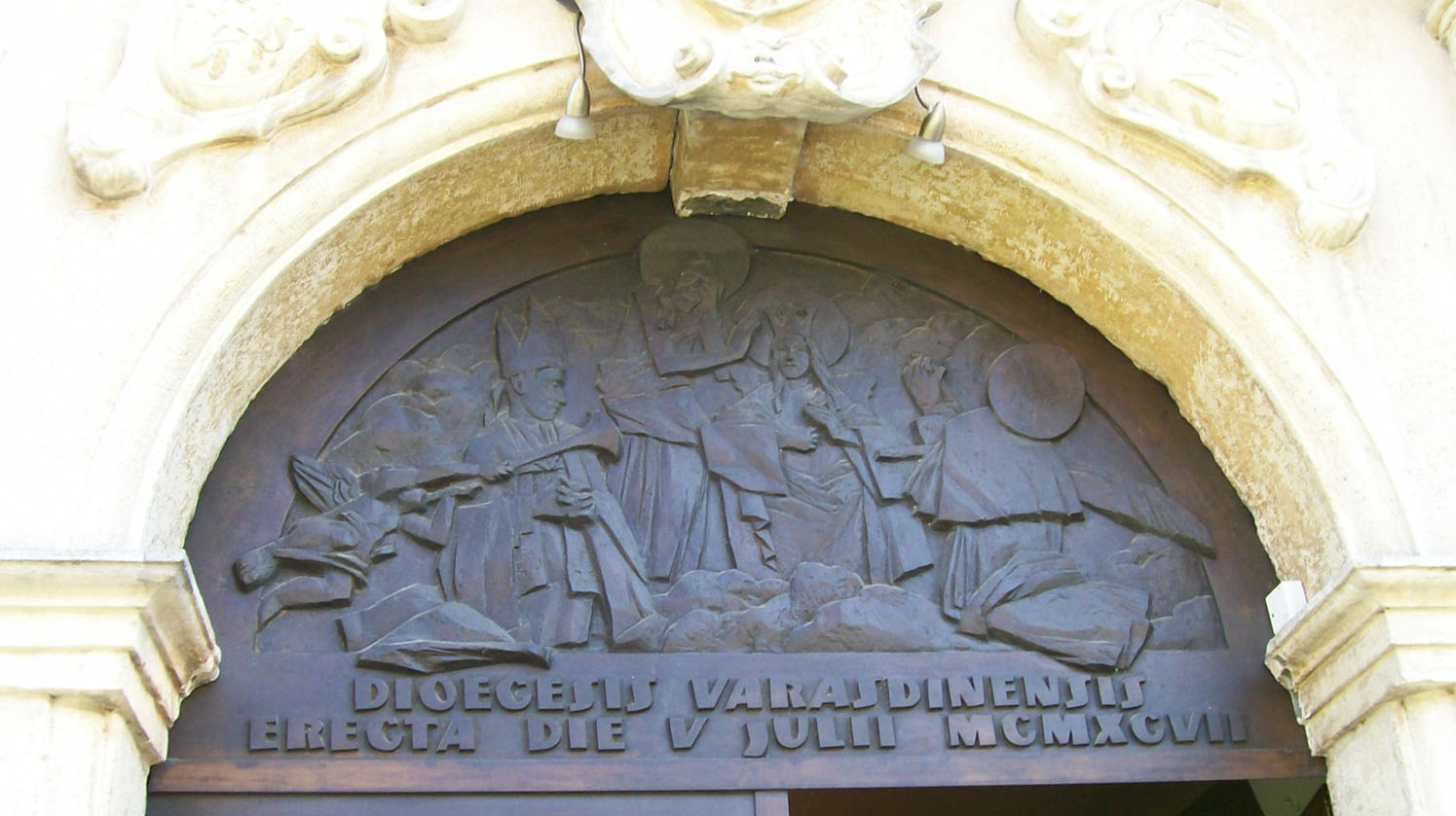 Natpis na ulazu u Varaždinsku katedralu "Varaždinska biskupija uzdignuta 5. srpnja 1997."